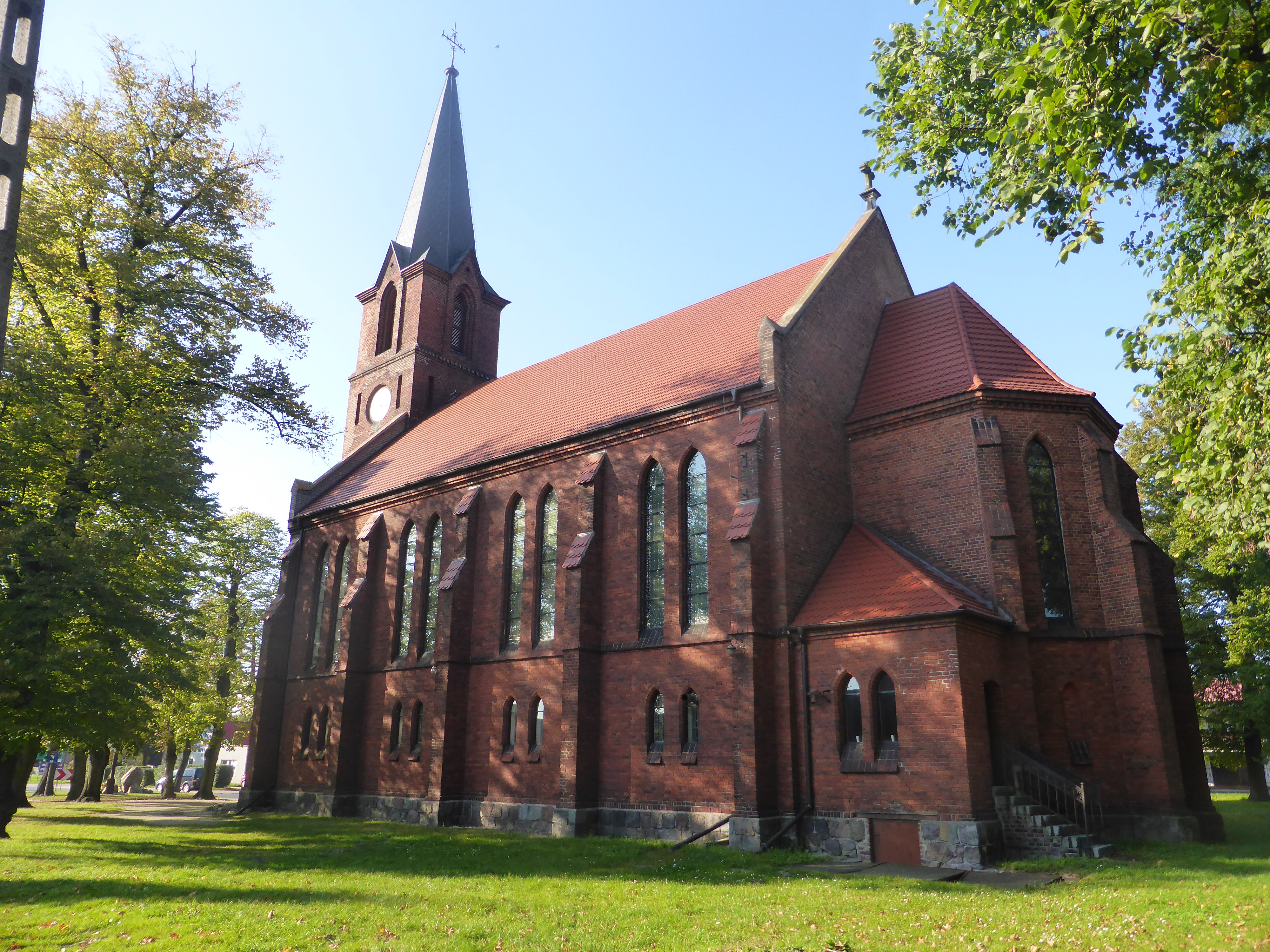 Poewangelicki kościół w Kuślinie, Wielkopolska